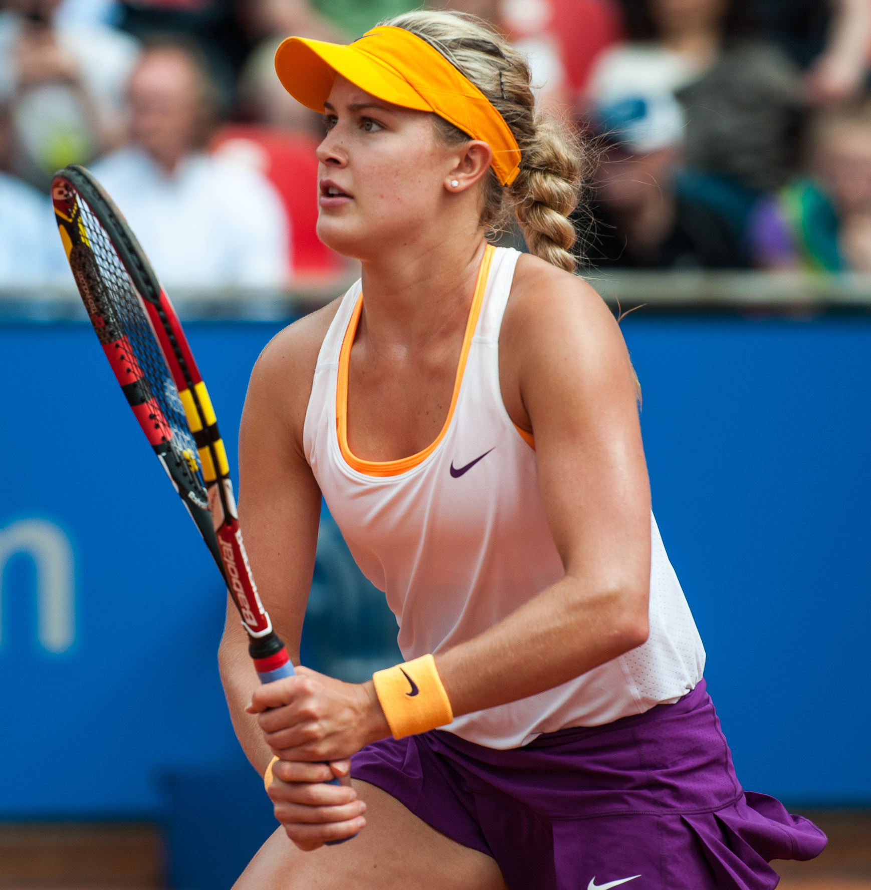 Damentennis,Eugenie Bouchard,Nürnberger Versicherungscup 2014,Tennis,WTA